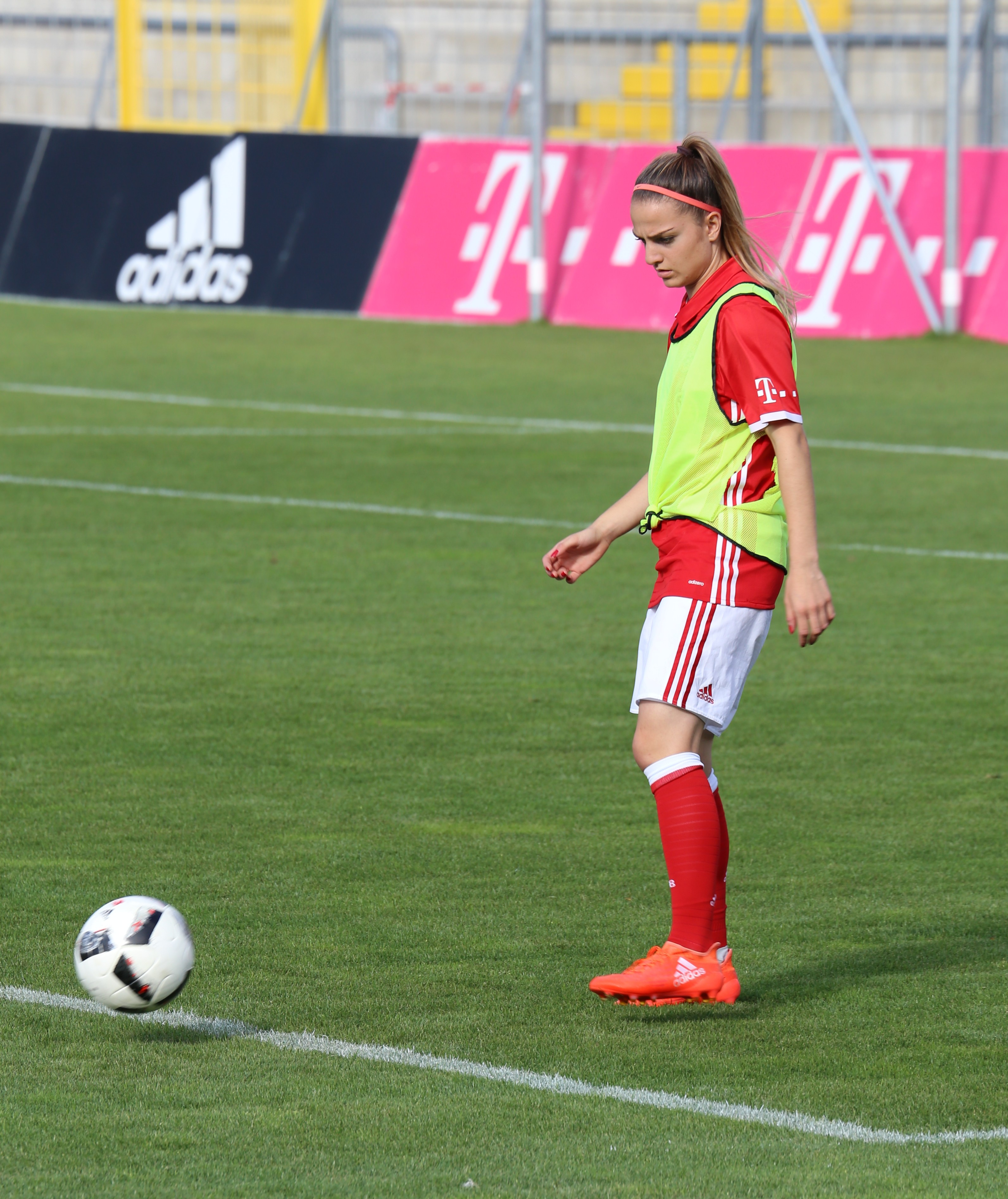 Melike Pekel, FC Bayern München, beim Aufwärmen vor dem Frauen-Bundesliga-Spiel FC Bayern München gegen SC Freiburg am 3. September 2016 im Stadion an der Grünwalder Straße (Ergebnis war 1:1).